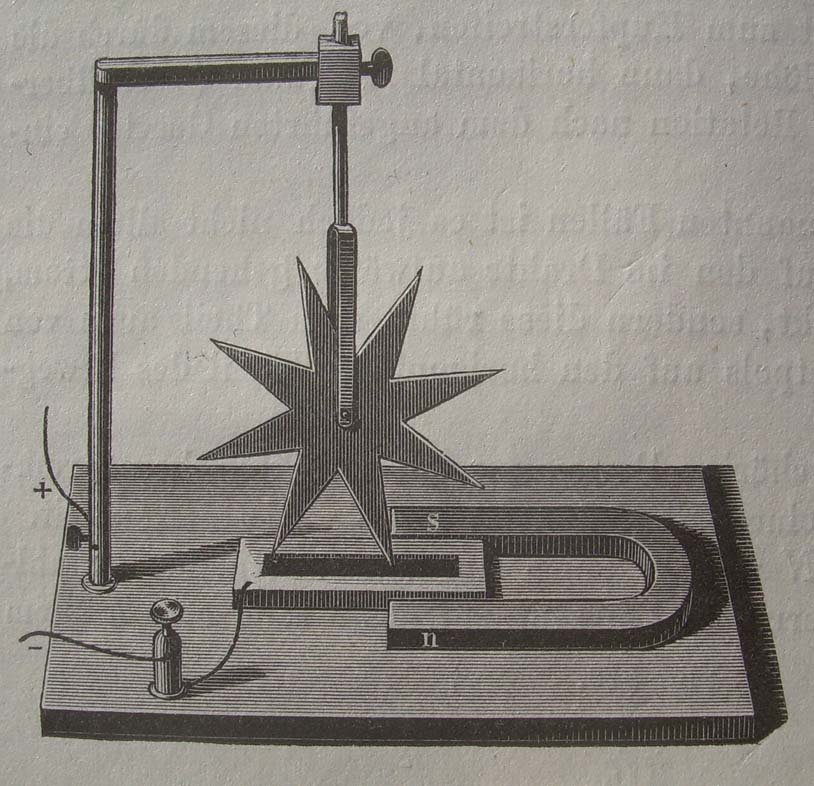 Barlow's Rädchen